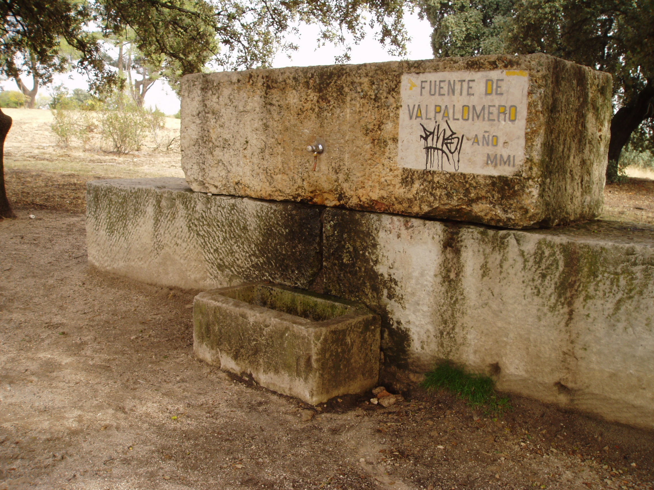 Fuente de Valpalomero. Monte de El Pardo. GR-124. Senda Real. Madrid. España.